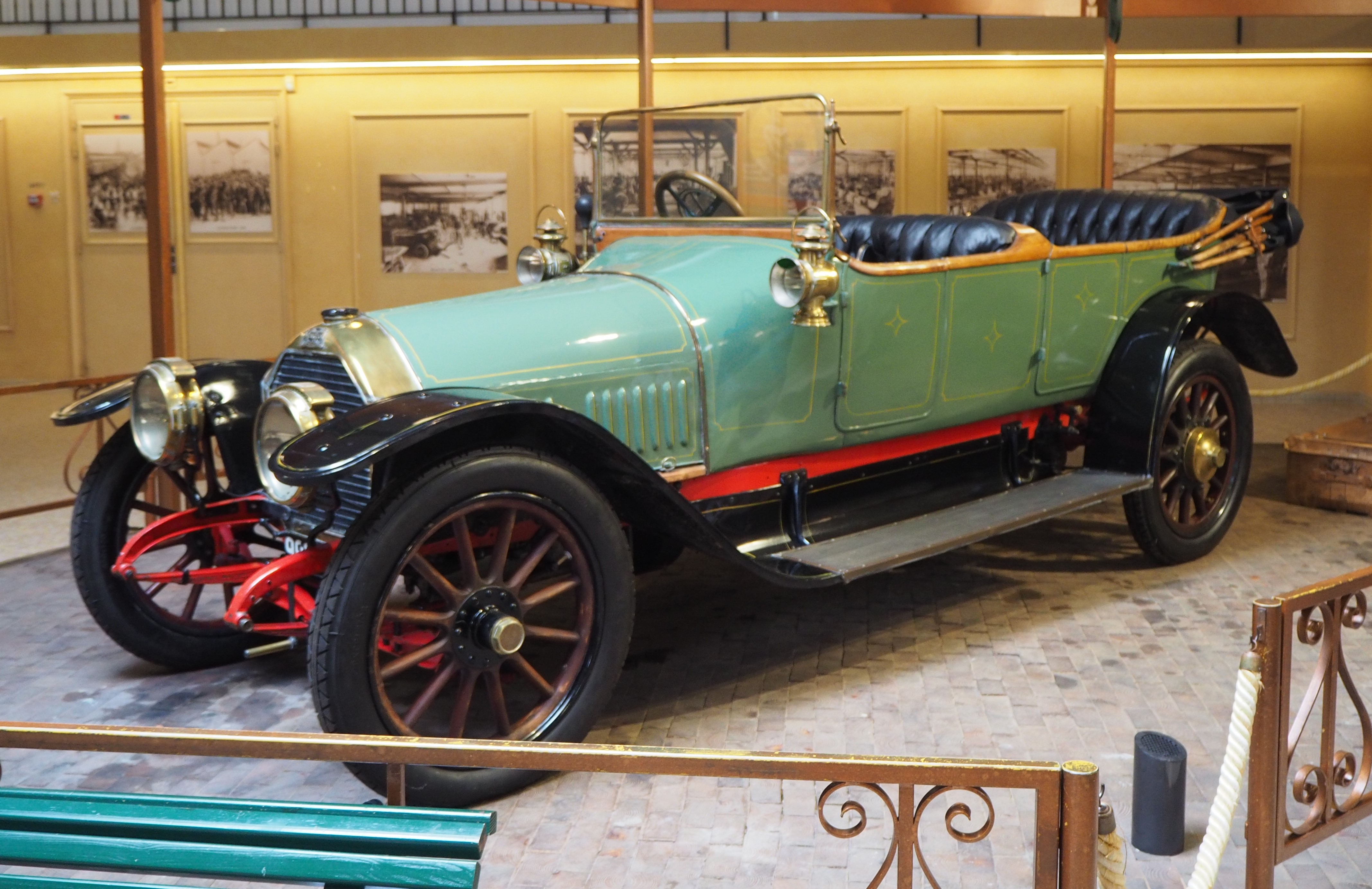 1911 Peugeot Type 135